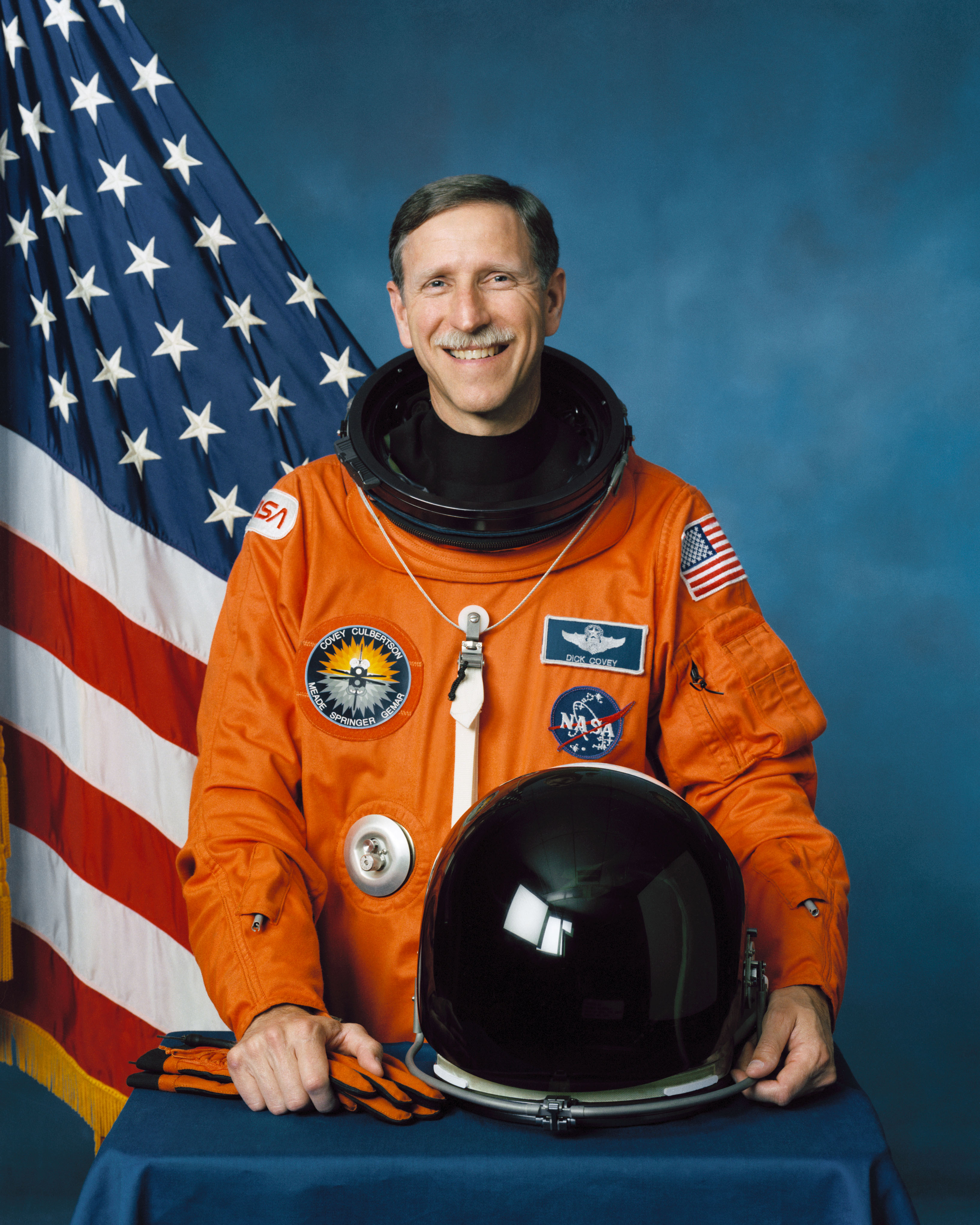 Richard Oswalt Covey